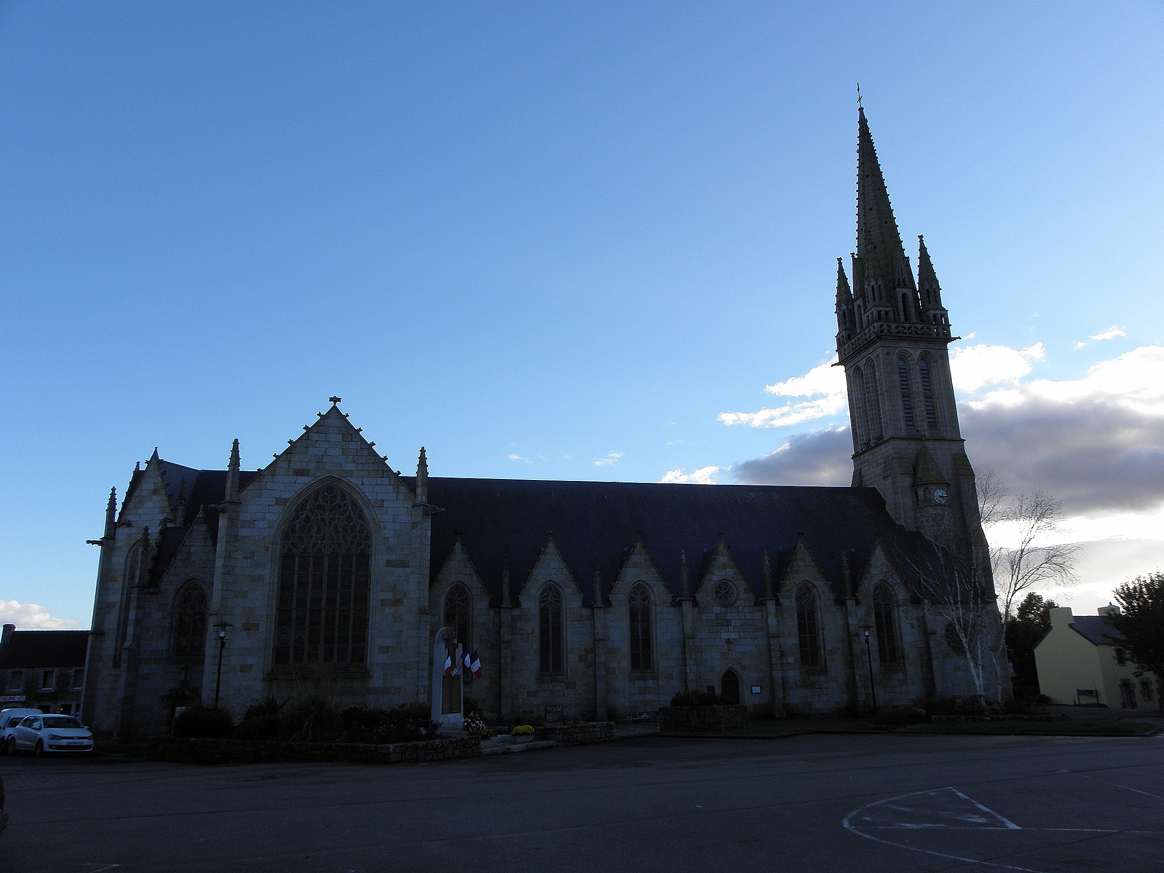 Vue septentrionale de l'église Saint-Ignace à Plouigneau (29).